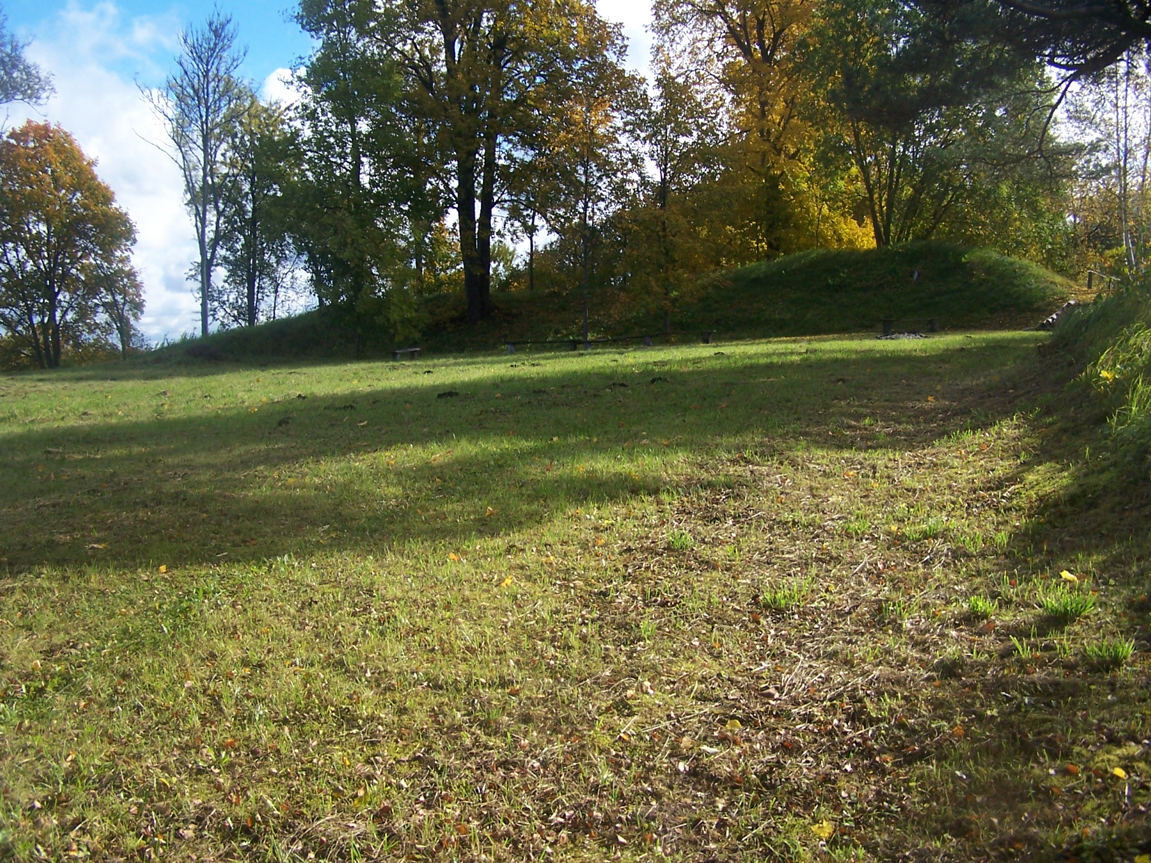 Stirniškių piliakalnio aikštelė